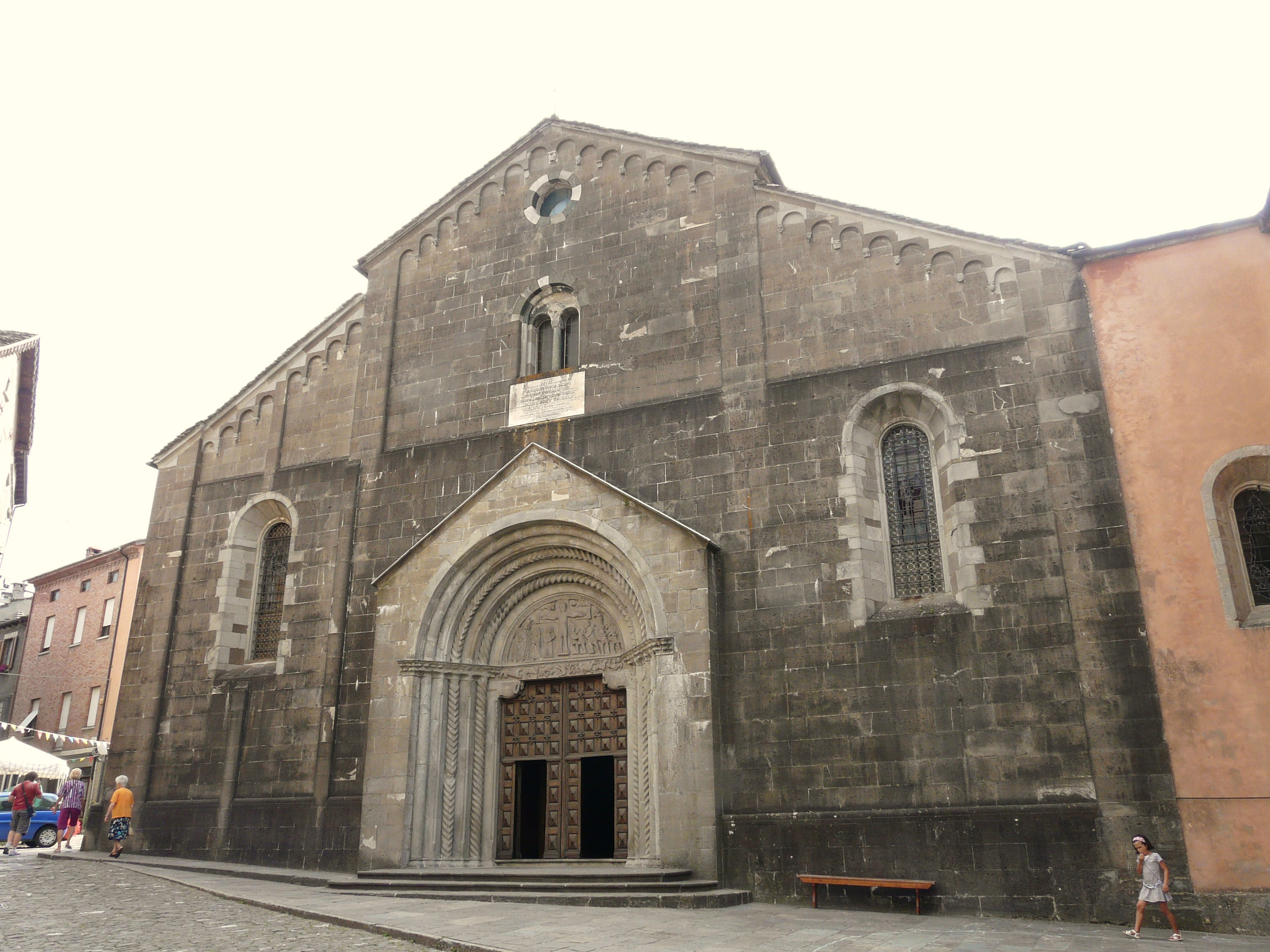 Duomo di Berceto, Emilia Romagna, Italia